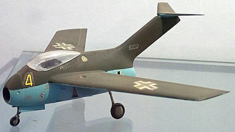 Ta 183 Modell, eigenes Bild